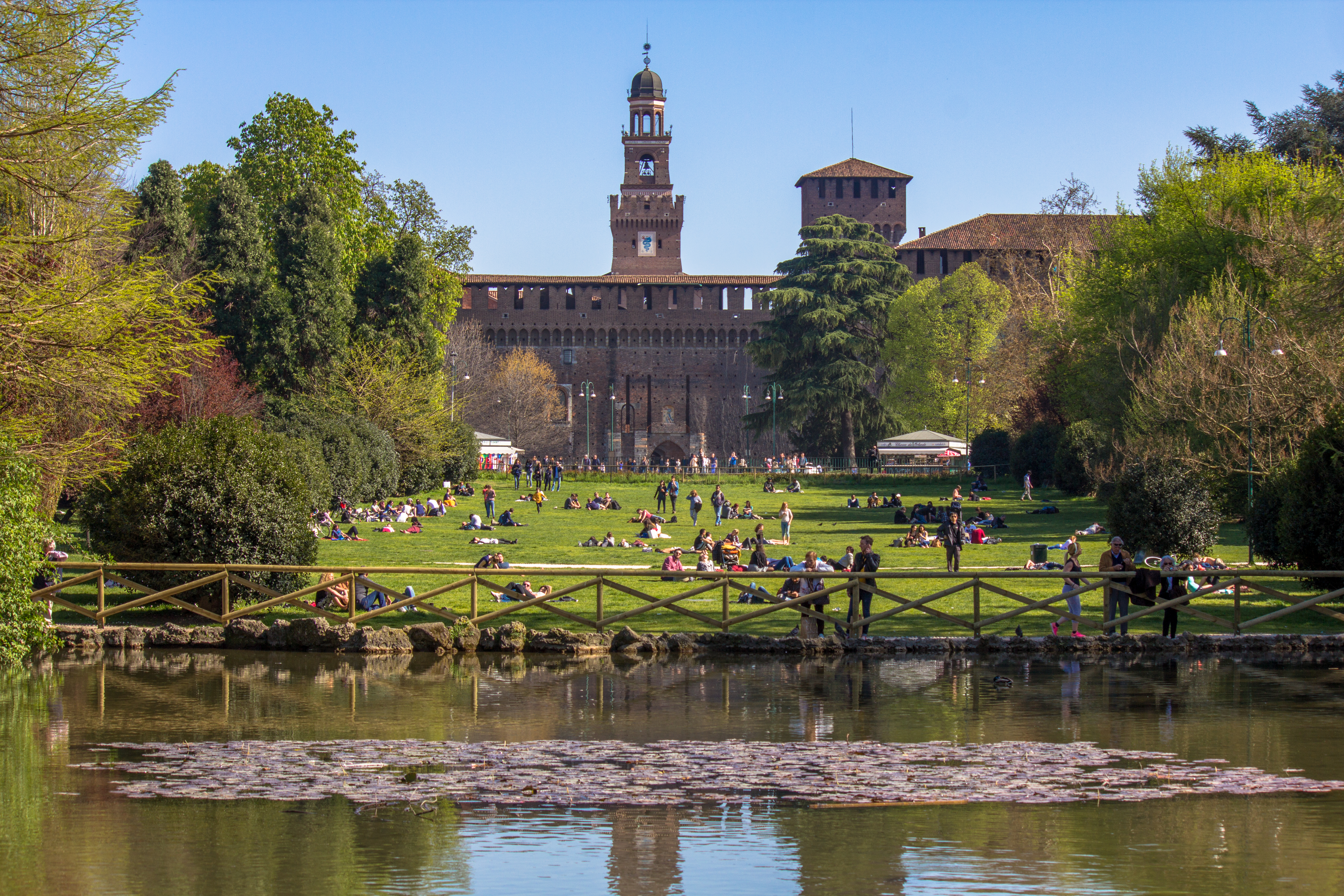 Vista del Castello Sforzesco dal Parco Sempione, Milano, Italia This is a photo of a monument which is part of cultural heritage of Italy.